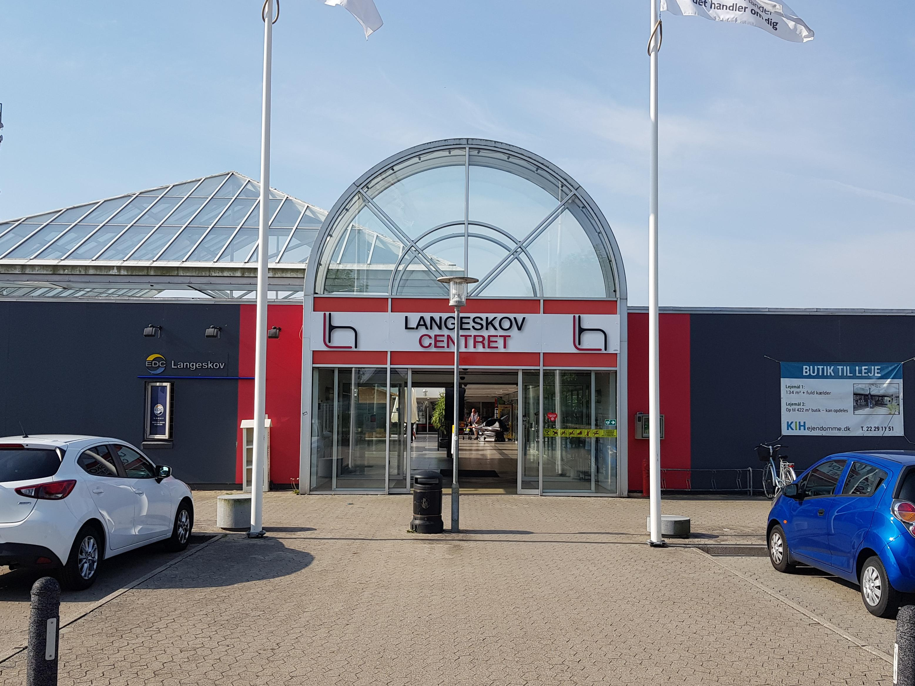 Langeskovcentrets nordlige indgang